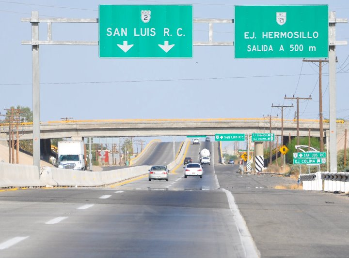 Entrada del Ejido Hermosillo